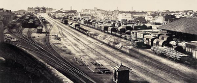 En 1860 carte postale de la gare de Marseille Saint-Charles.